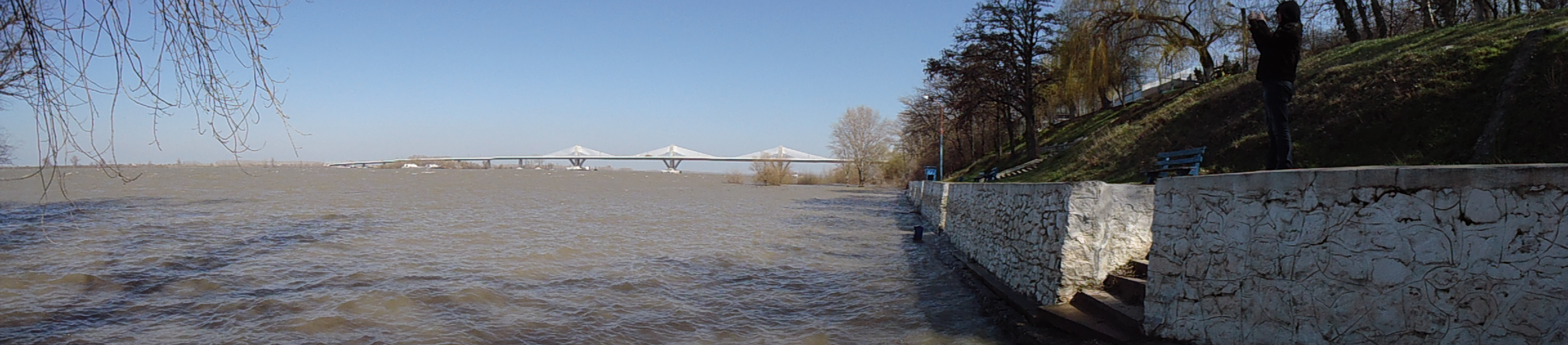 Podul Calafat - Vidin in martie 2013. Poza facuta de pe malul romanesc.